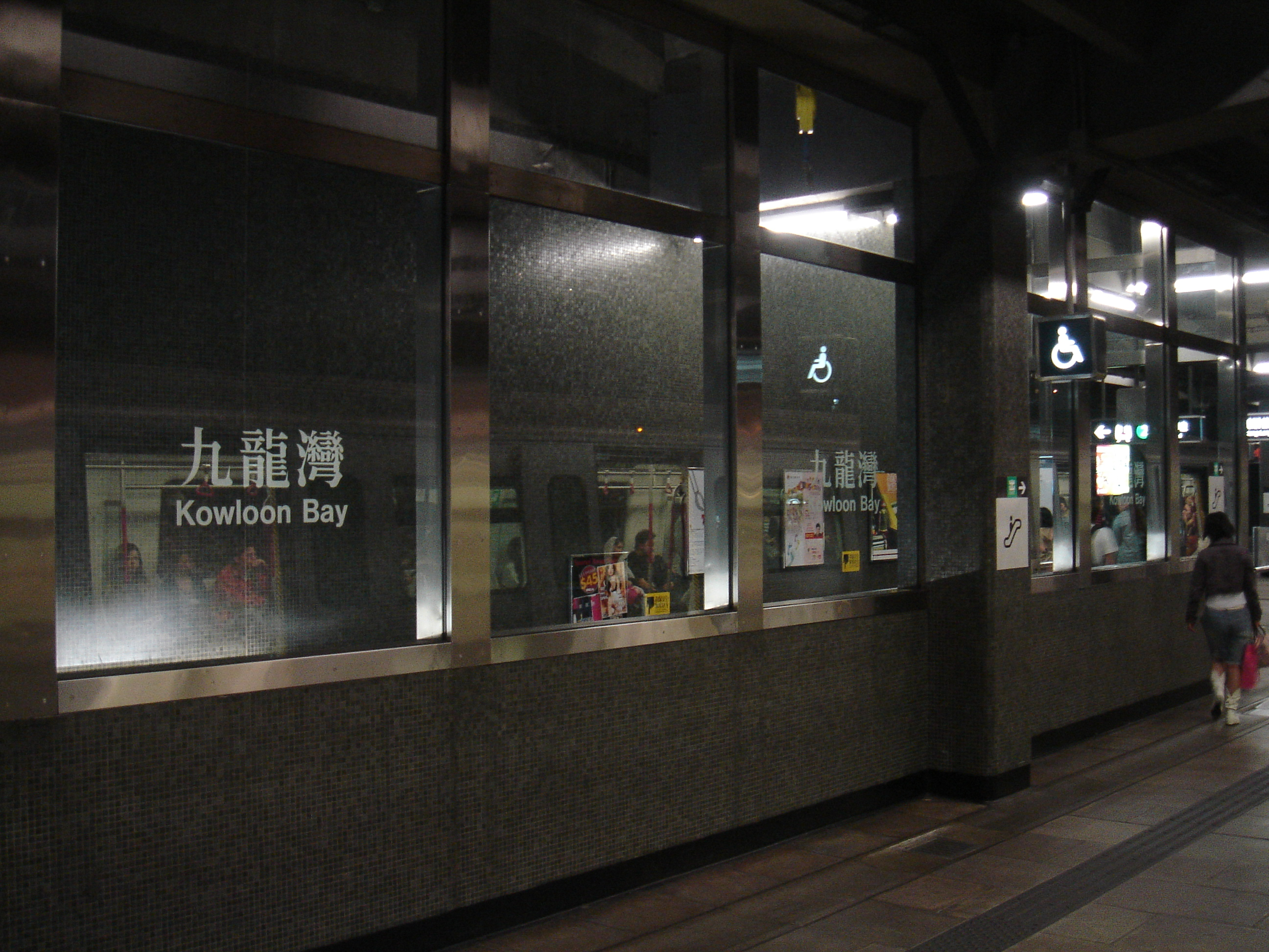 Kowloon Bay (九龍灣) Station, Kwun Tong Line, MTR Hong Kong.